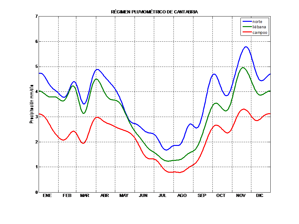 El régimen temporal que se muestra se ha generado realizando una agregación semanal de la precipitación a partir del dato diario, para tres zonas diferentes de Cantabria.